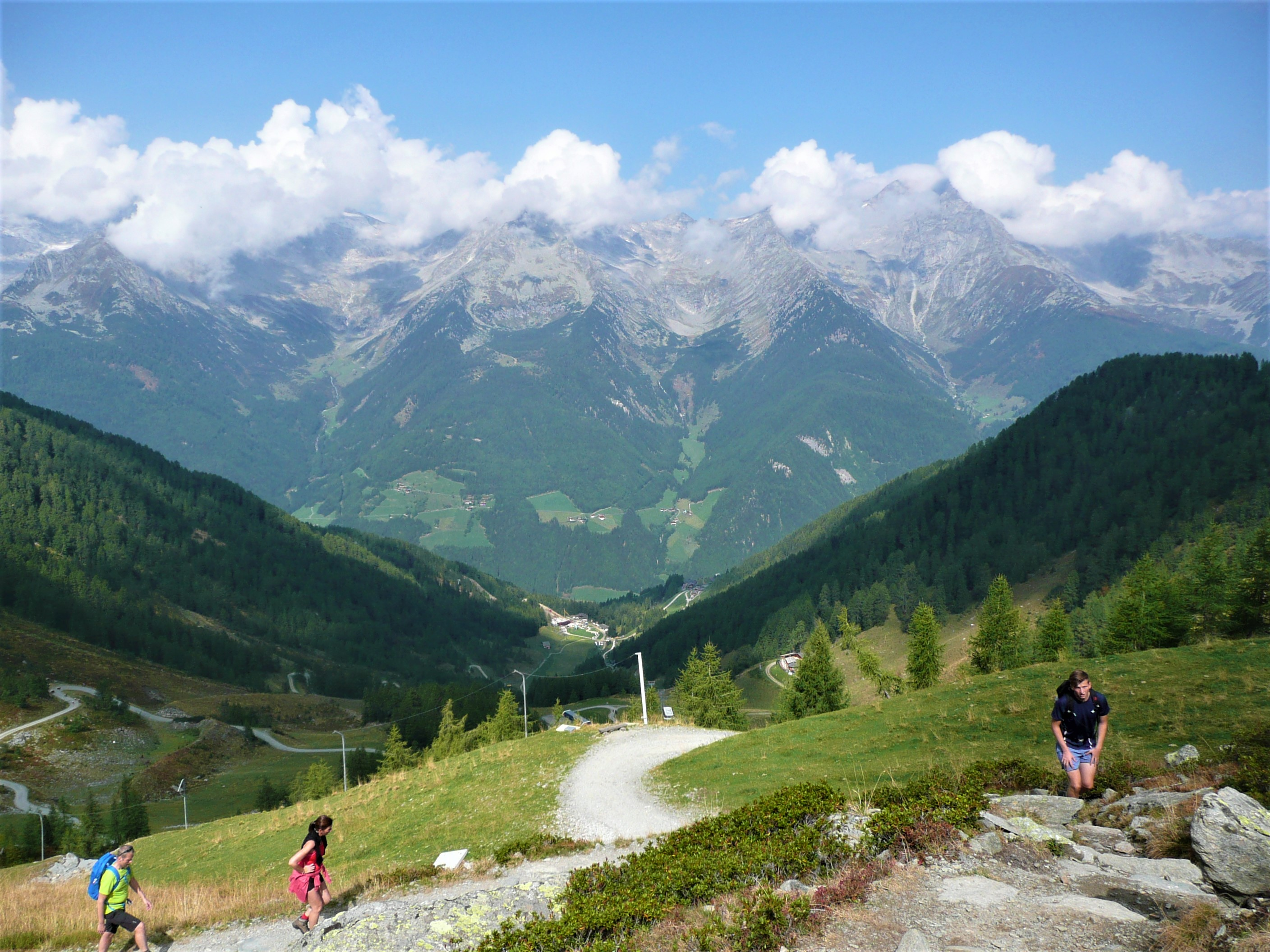 Zillertaler Hauptkamm von dem Klaussee aus gesehen